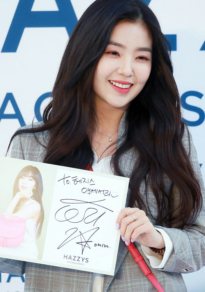 Irene Bae no Hazzys Accessories Fansign, em 16 de março de 2018